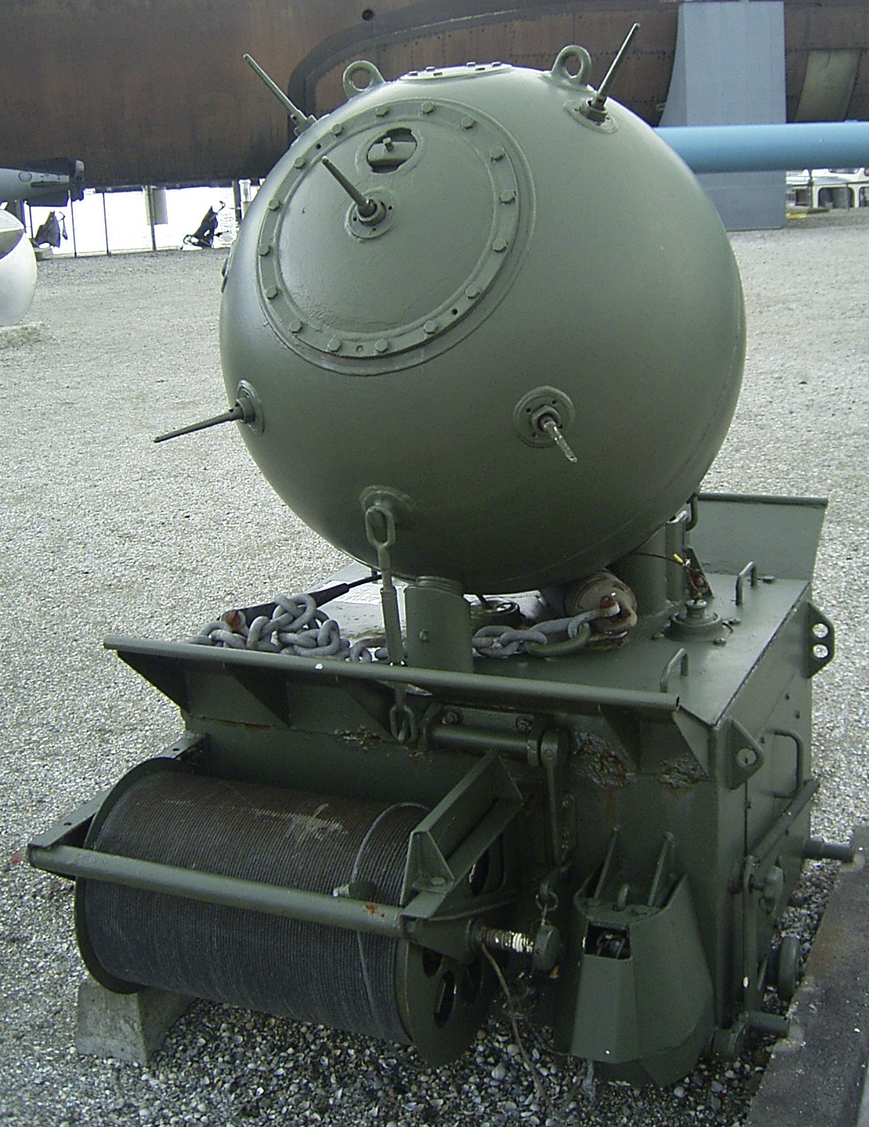 Deutsche Ankertaumine DM 21 aus der Sammlung des Marinemuseums Wilhelmshaven. Die Ladung von ca. 40 kg TNT wurde elektrisch gezündet wenn die sog. Hörner bei Kontakt mit einem Schiffsrumpf deformiert wurden. Mine im Transportzustand. Unten im Vordergrund, die Seiltrommel mit dem Drahtseil des so genannten Voreilgewichts, mit dessen Hilfe die Mine auf eine bestimmte Tiefe voreingestellt wird. Das als Ankertau bezeichnete Drahtseil, das die Mine mit dem Minenwagen (auch Ankerstuhl) verbindet, befindet sich im Minenwagen, der als Anker der Mine am Grund verbleibt.